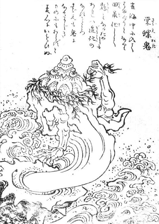 Sazae-oni (栄螺鬼) from the Gazu Hyakki Tsurezure Bukuro (百器徒然袋)